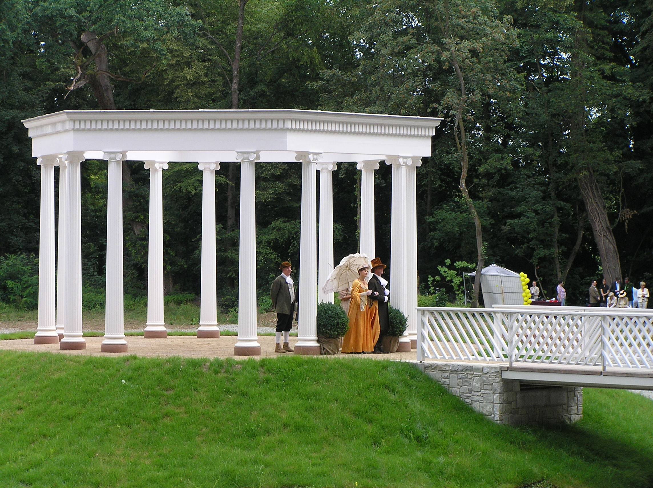 Eröffnung Kleiner Tannenwald